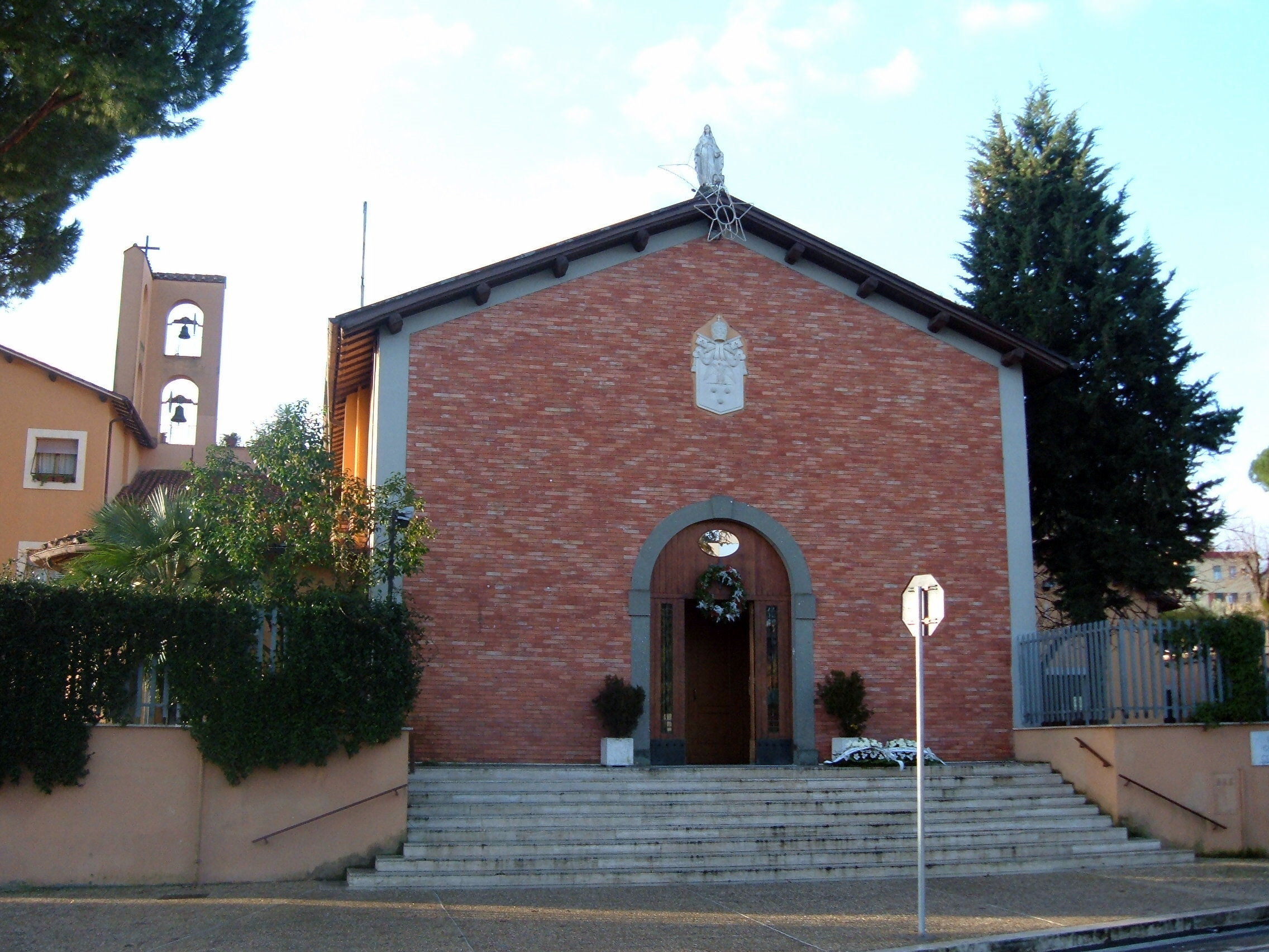 Chiesa di San Michele Arcangelo, a Roma, nel quartiere Pietralata. Esterno.